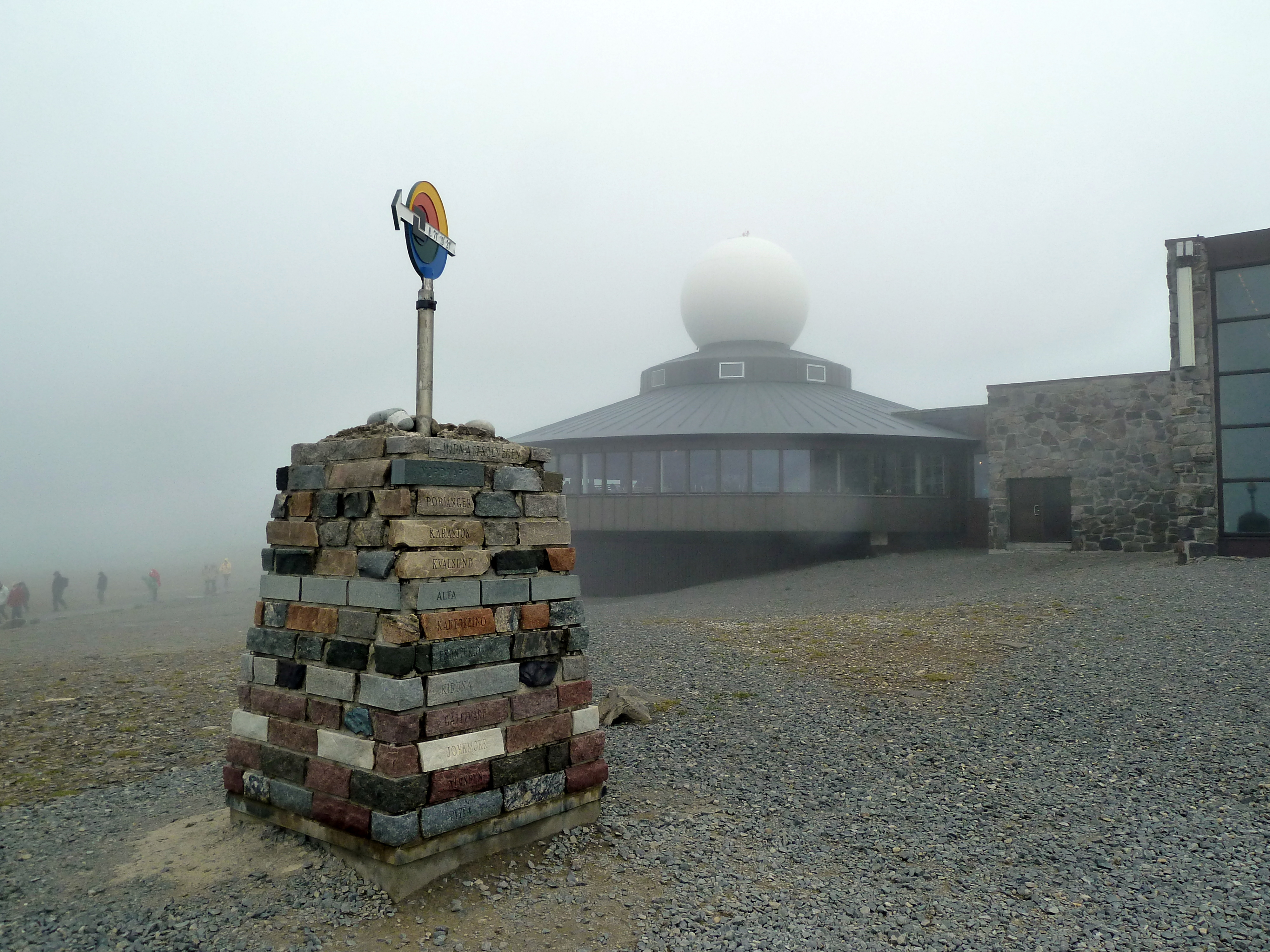 2010-08-01 - Nordkaphallen im Nebel